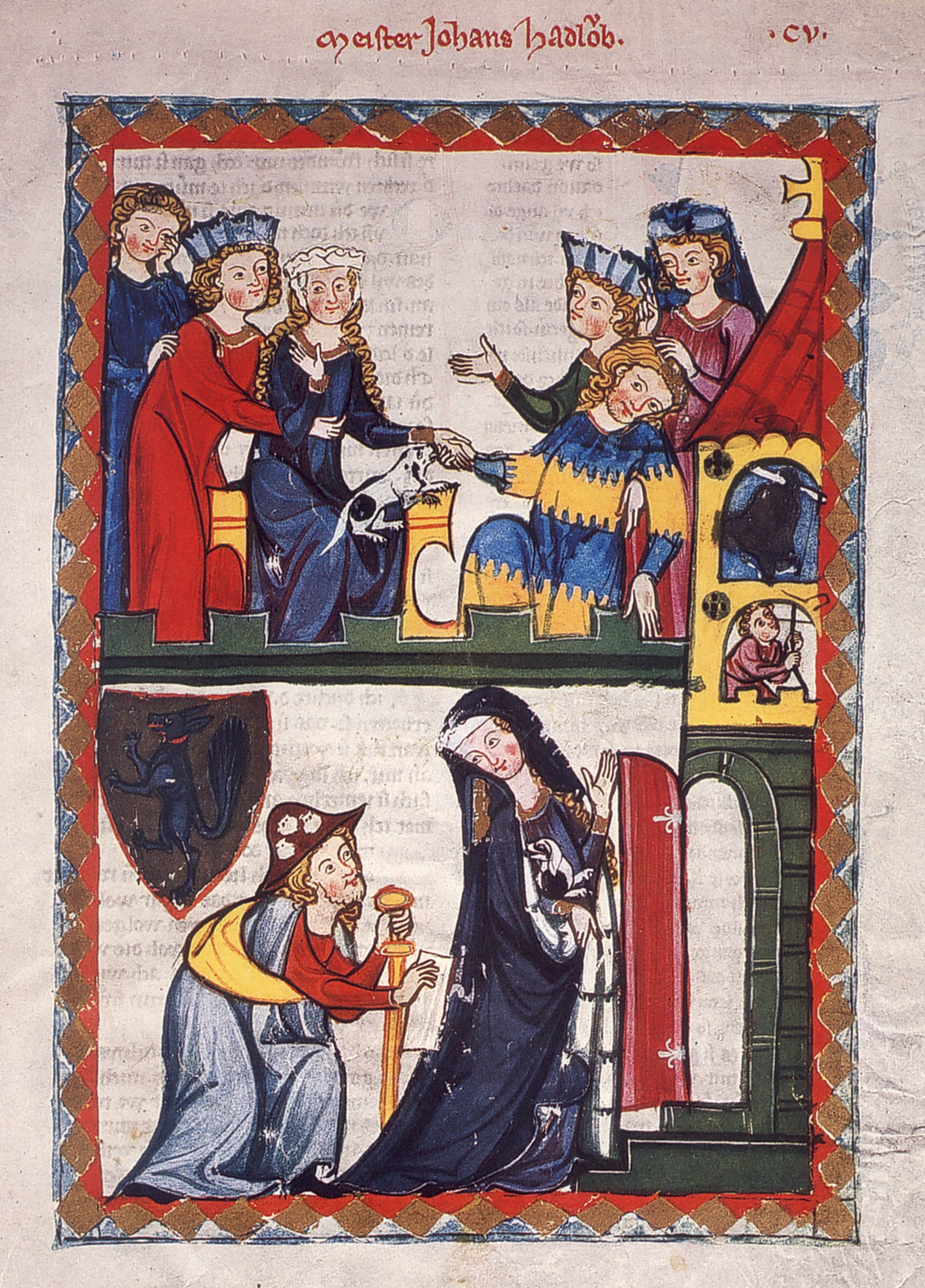 Codex Manesse, UB Heidelberg, Cod. Pal. germ. 848, fol. 371r, Meister Johannes Hadlaub